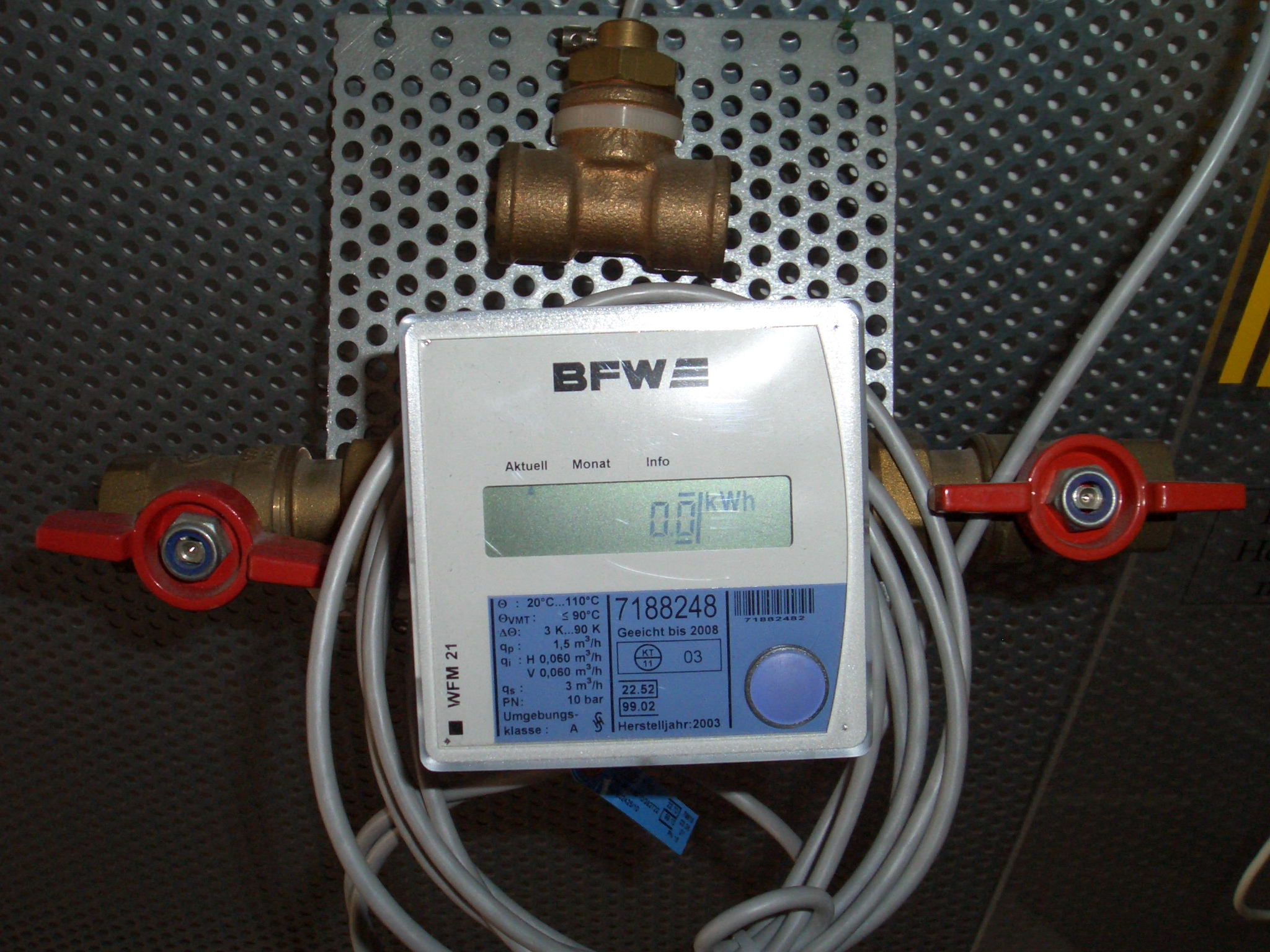 Elektronischer Wärmezähler